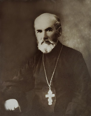 Настоятель Осовецкой церкви в годы ВОВ